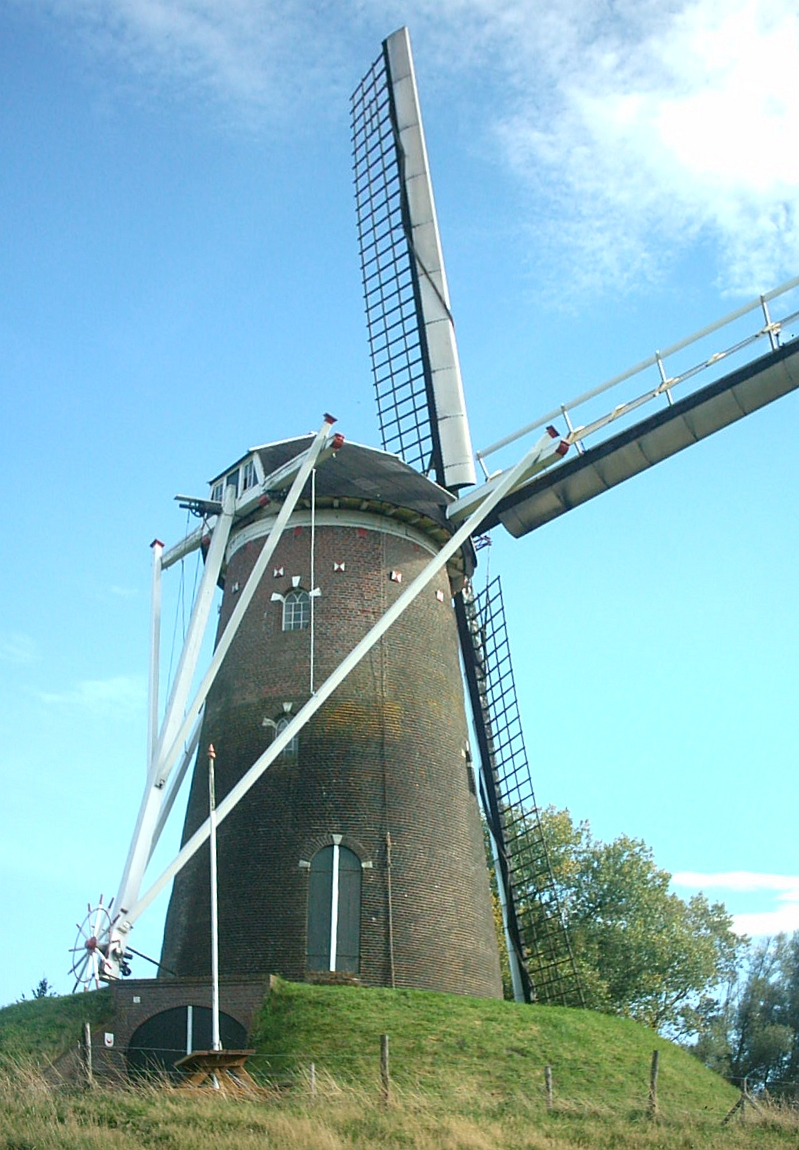 Bredevoort, mill "Prins van Oranje".